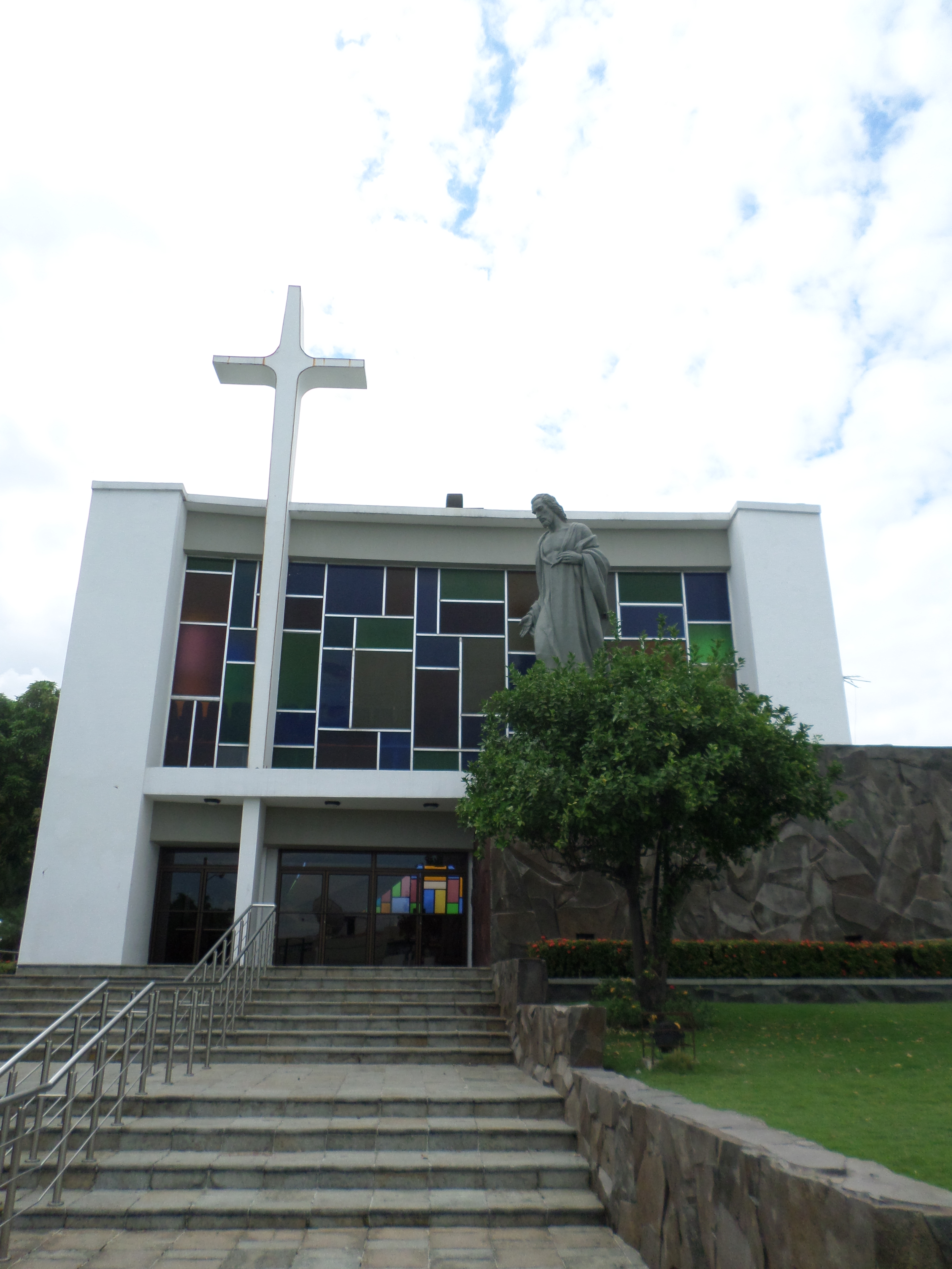 aula magana